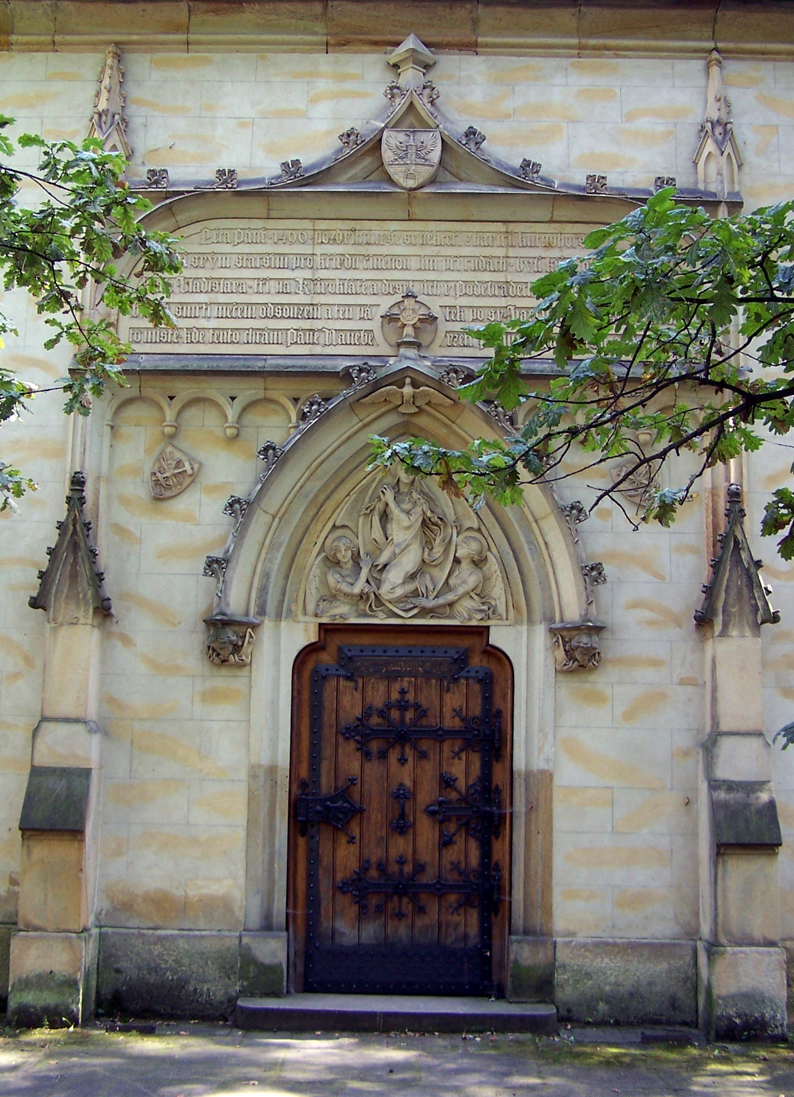 Havířský kostelík (Kostel Nanebevzetí Panny Marie) v Poděbradech. Vstupní portál od Josefa Schnircha